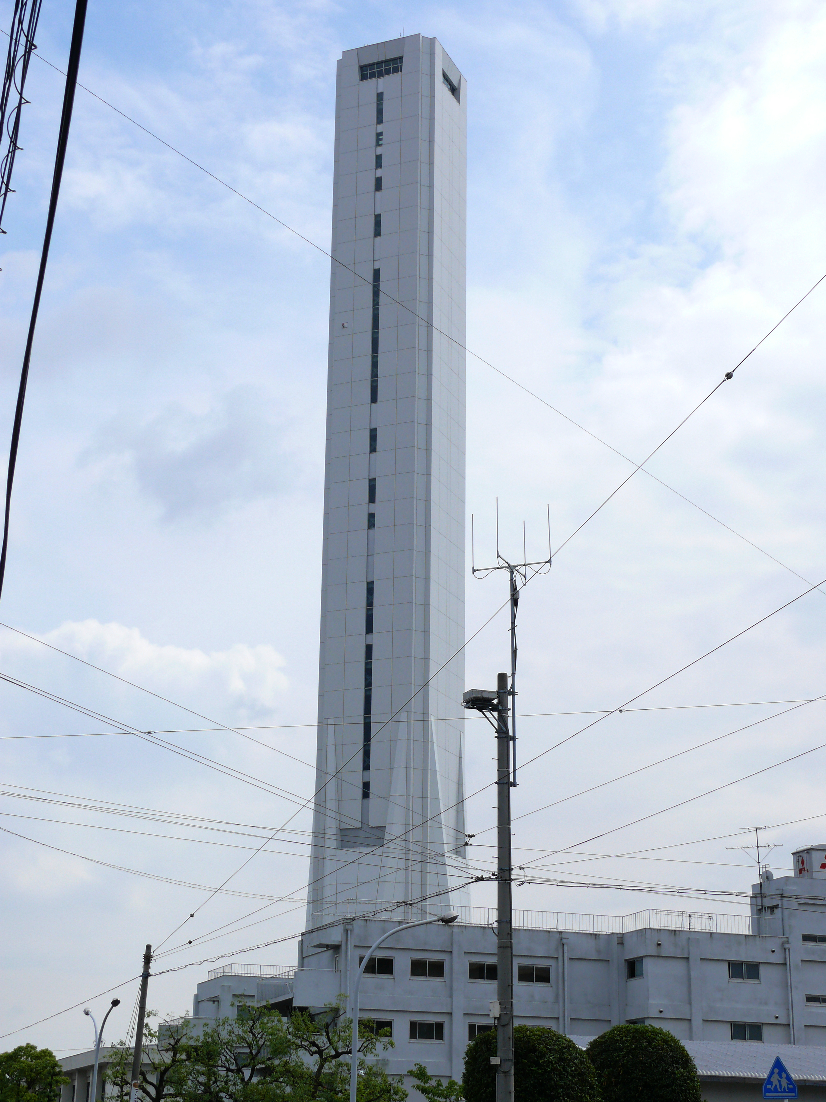 三菱電気のエレベーター実験塔「ソラエ」。